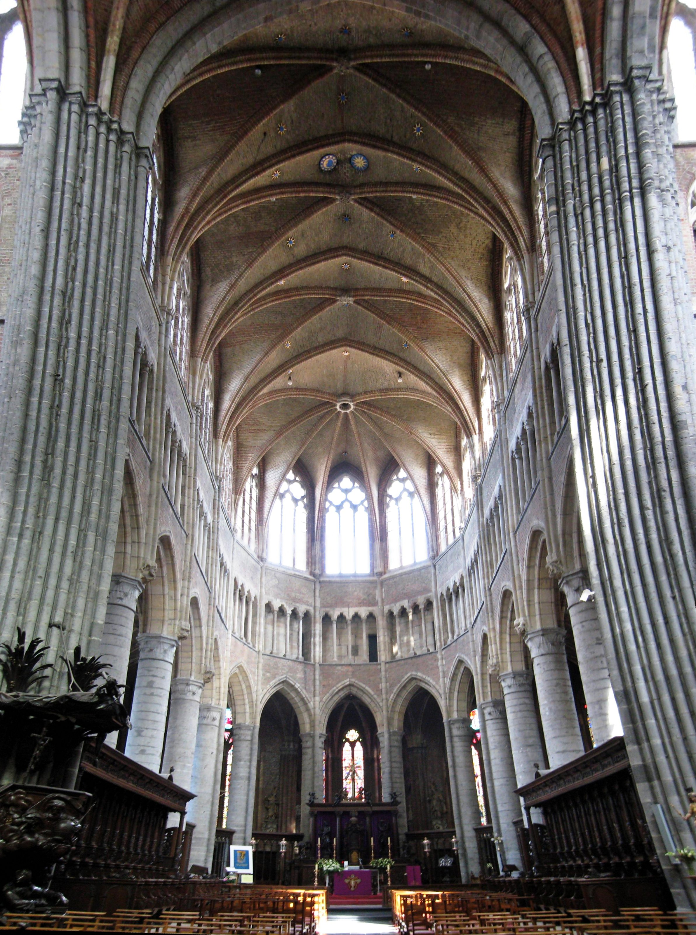 Kirche in Veurne